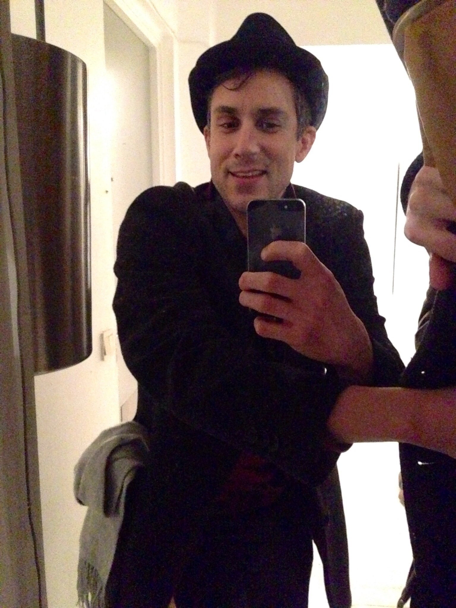 Skådespelare Martin Aliaga